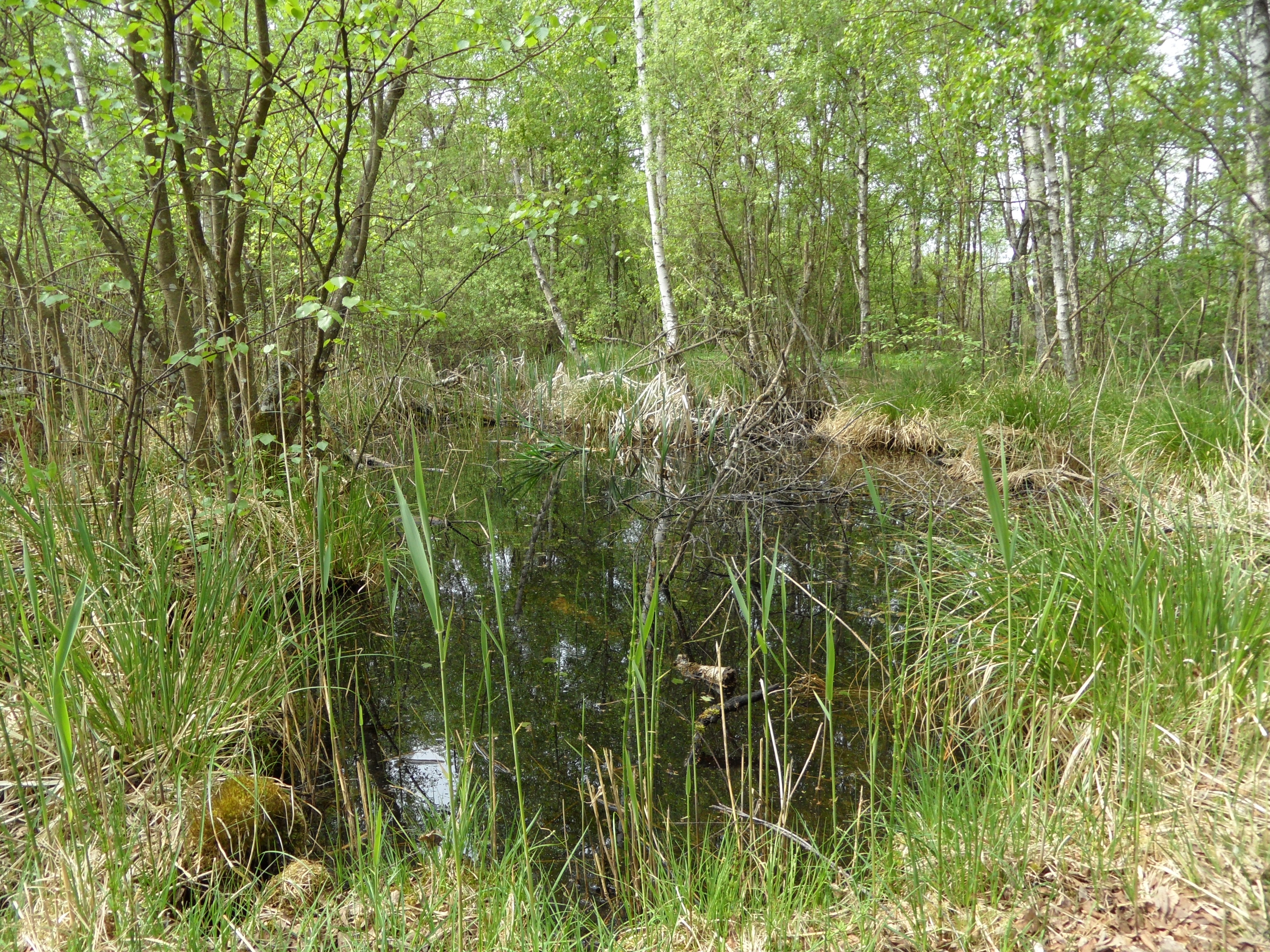 Naturreservat Åraslövs mosse torvgrav